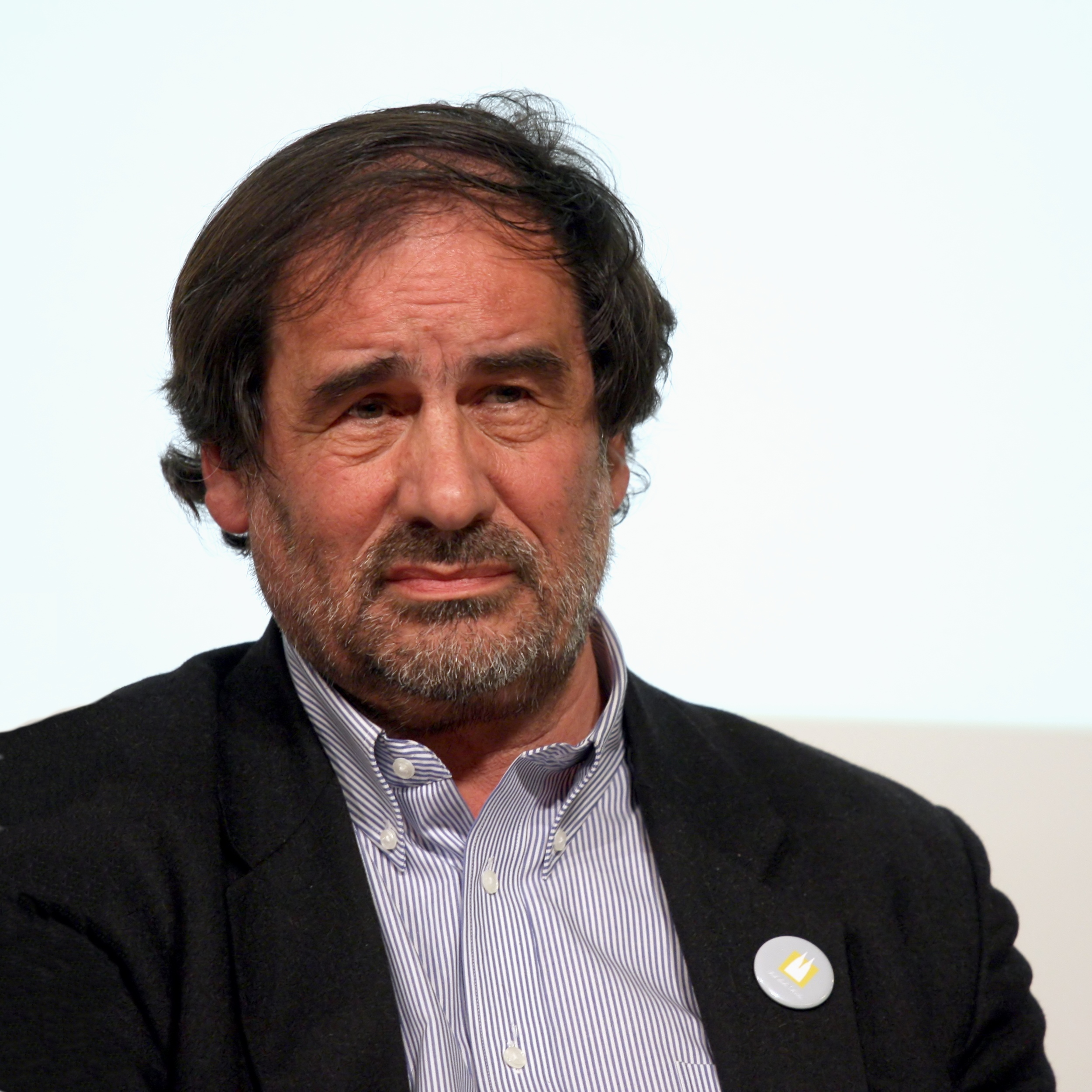 Philippe Chaix, auf der Veranstaltung "Schauspielhaus: Neubau oder Sanierung. BDA Montagsgespräch zum aktuellen Stand der Planung" im Domforum Köln. Veranstalter: Bund Deutscher Architekten (BDA)